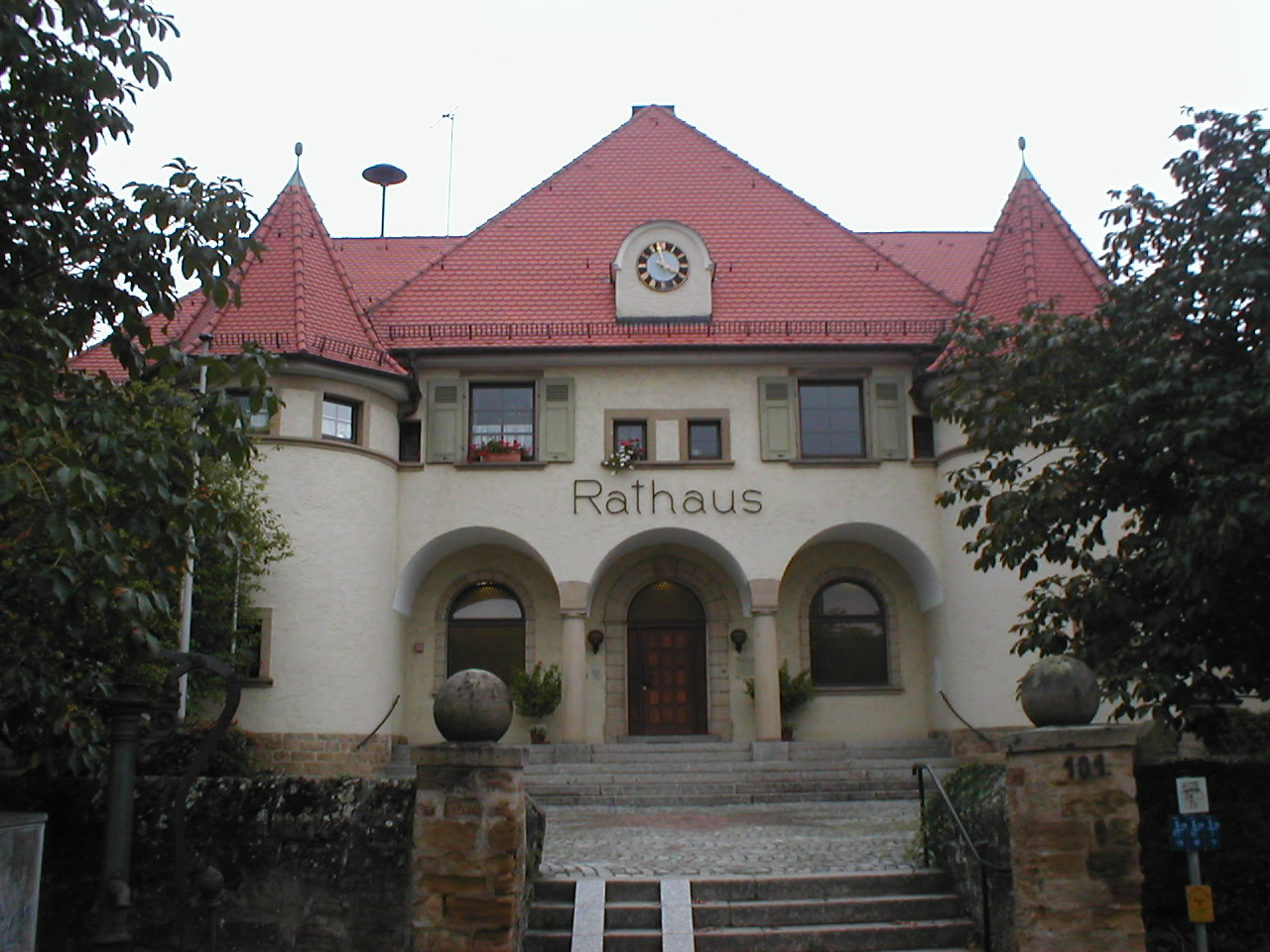 Rathaus von Ittlingen